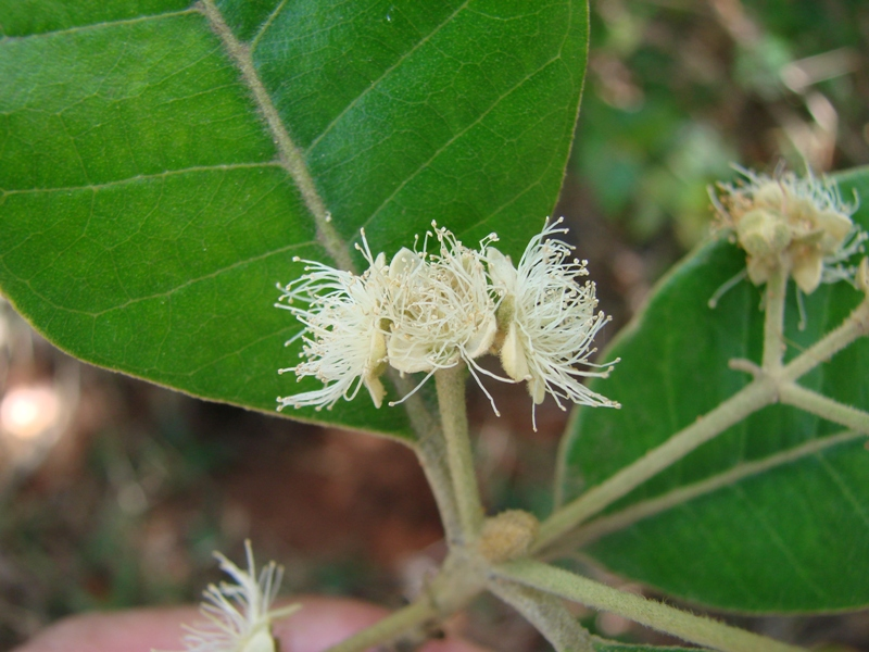 Pimenta pseudocaryophillus - MYRTACEAE Jardim Botânico de Brasília - DF - Brasil